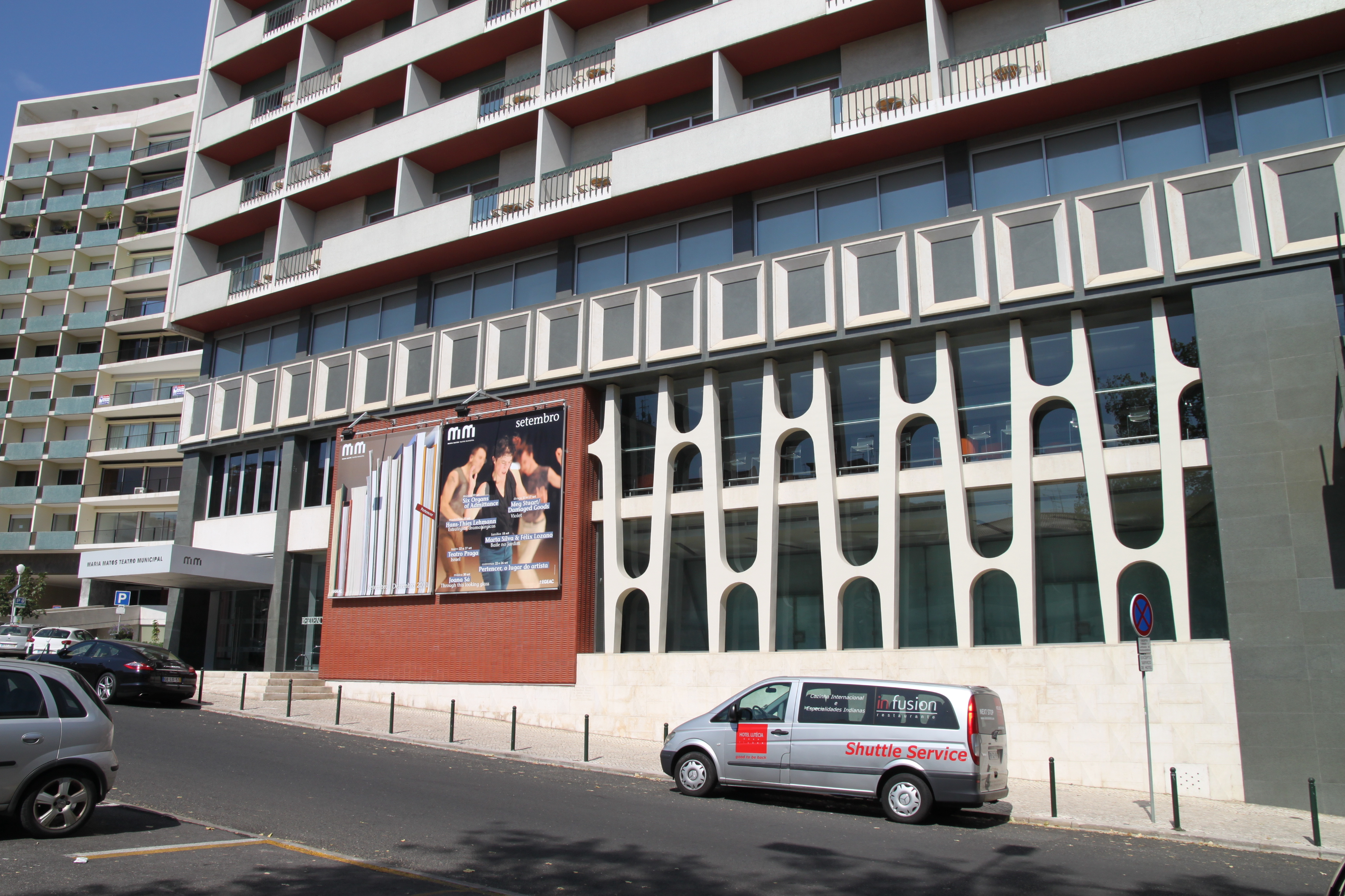 Teatro Municipal Maria Matos This file was uploaded for Wiki Loves Monuments in Portugal with the unique identifier 97011538.